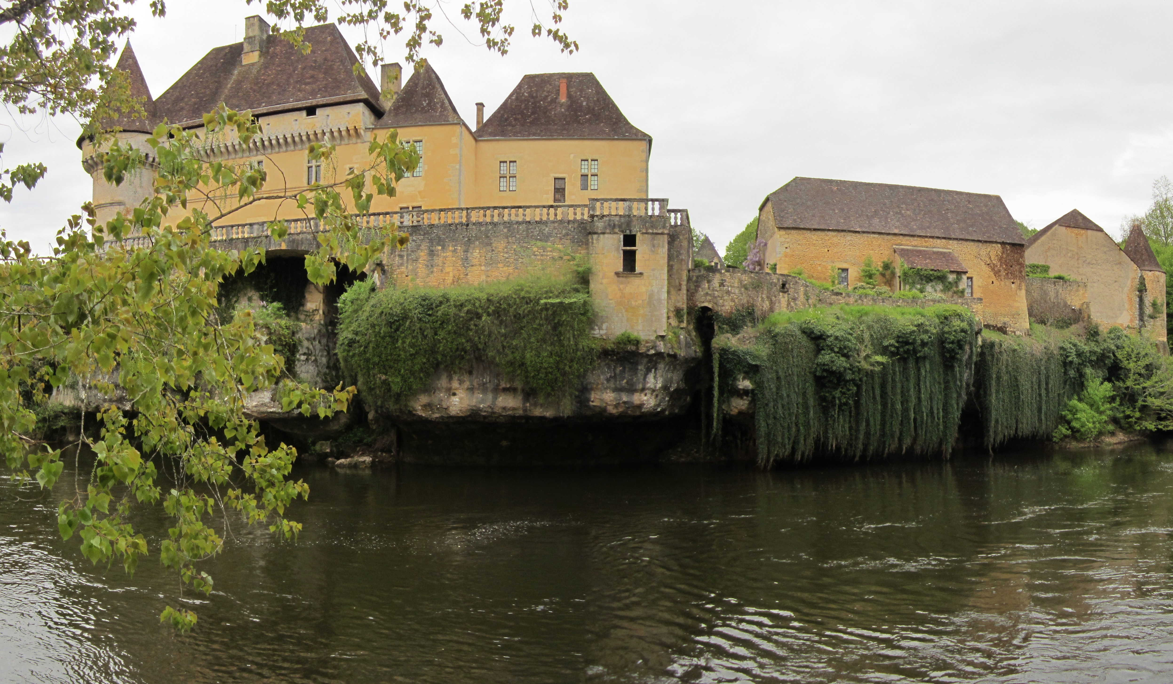 Château de Losse, Dordogne .